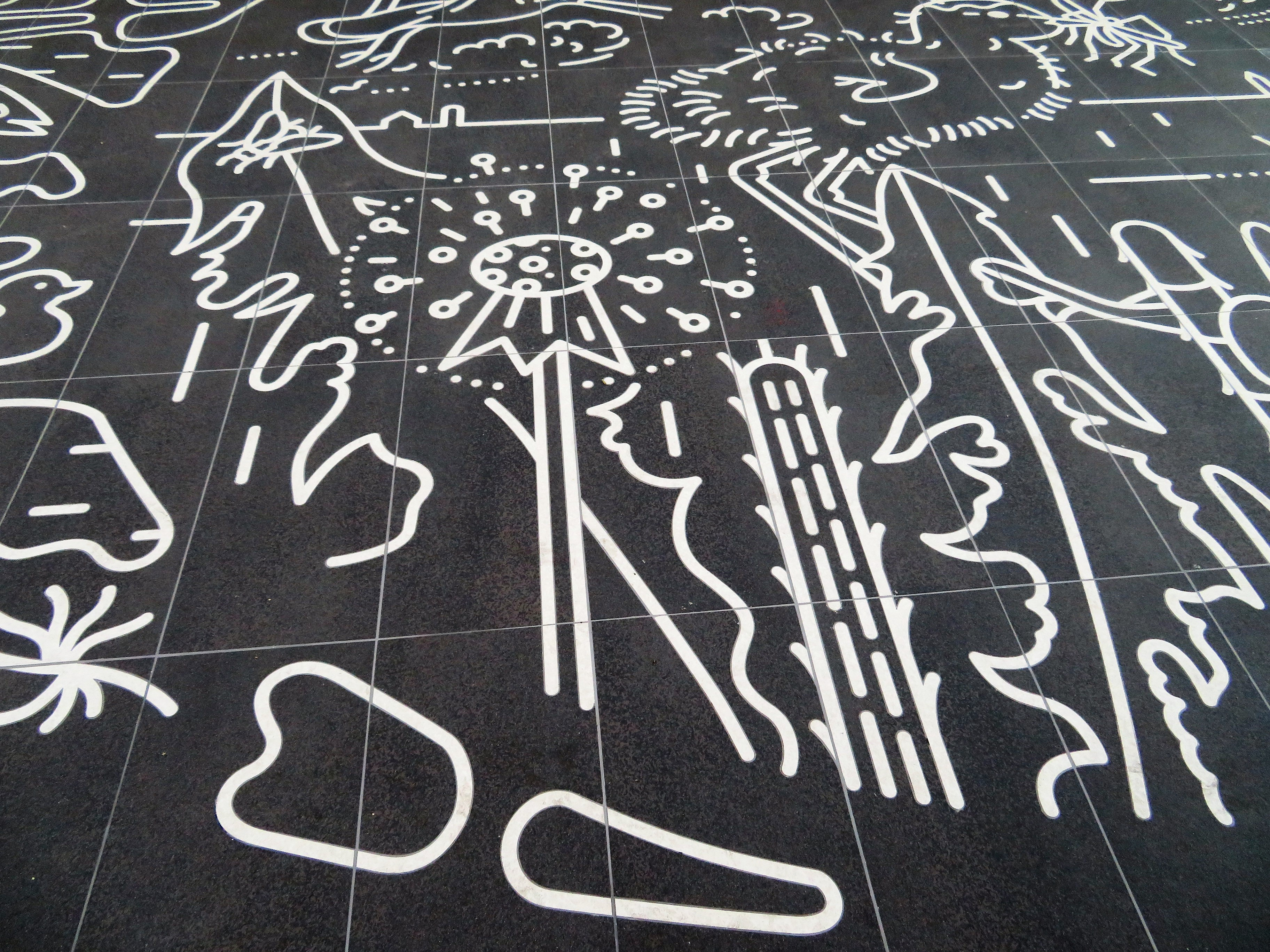 Metrostation Noord in Amsterdam, eindpunt van de Noord-Zuidlijn. Kunstwerk van Harmen Liemburg. Lijntekening van natuurtaferelen met vogels uit de omgeving van Amsterdam, ingelegd in de tegels van de perronvloer.